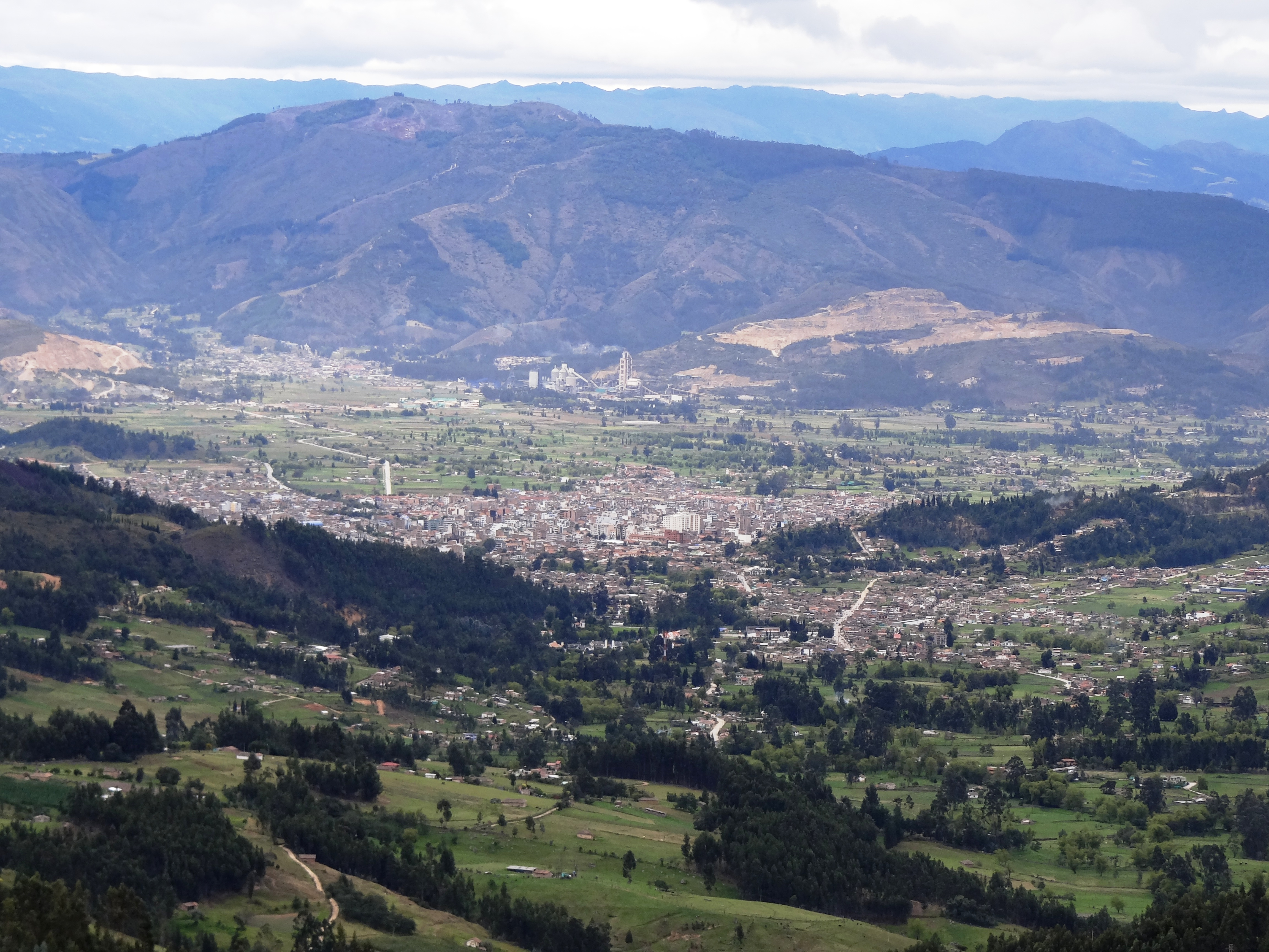 Panorámica de la ciudad de Sogamoso y alrededores en el departamento de Boyacá, Colombia.